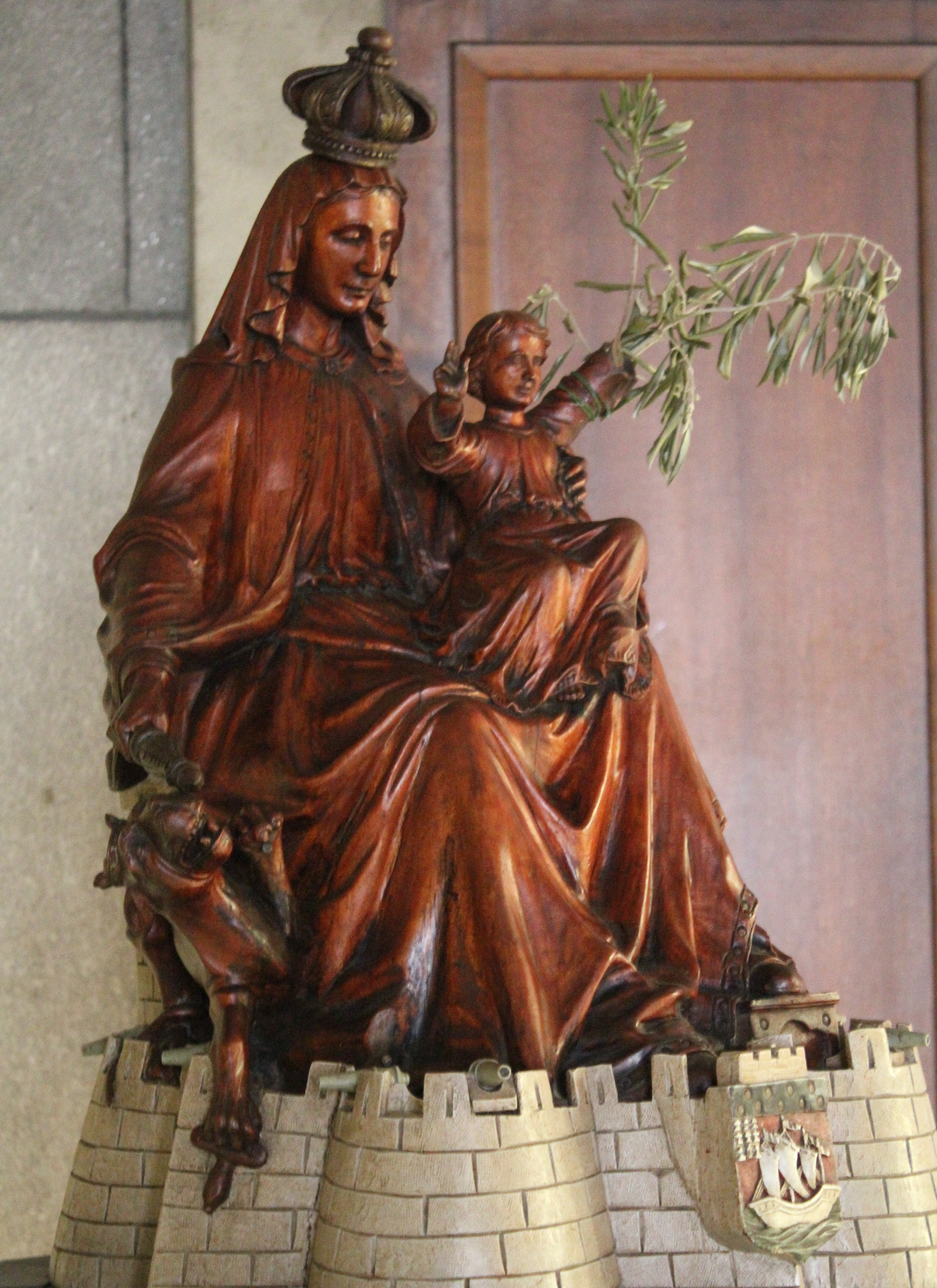 Statut de Notre Dame de Victoire à Lorient, faite suite au siège de la ville par les anglais en 1746. Le lion représente les anglais.